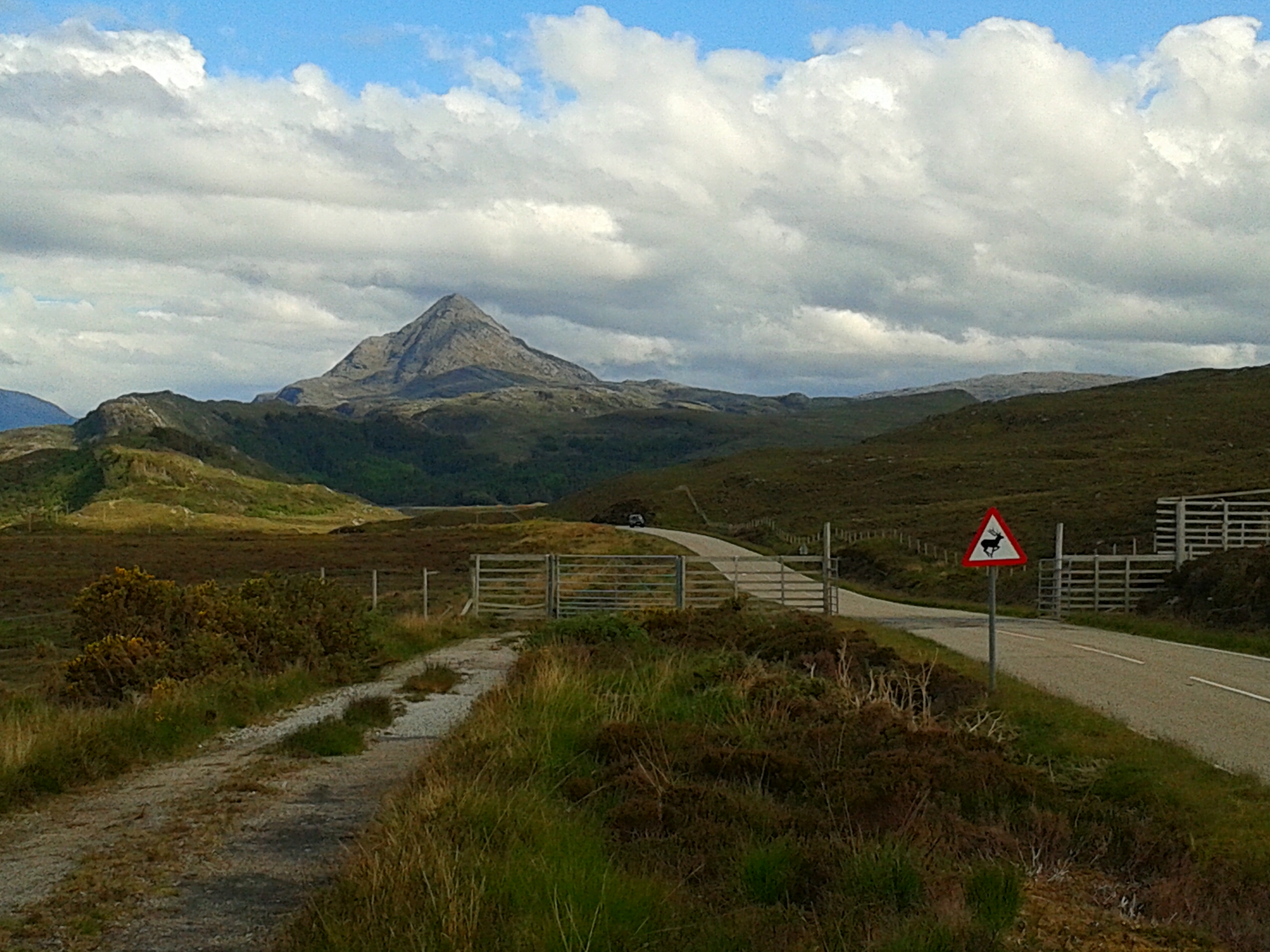 Ben Stack